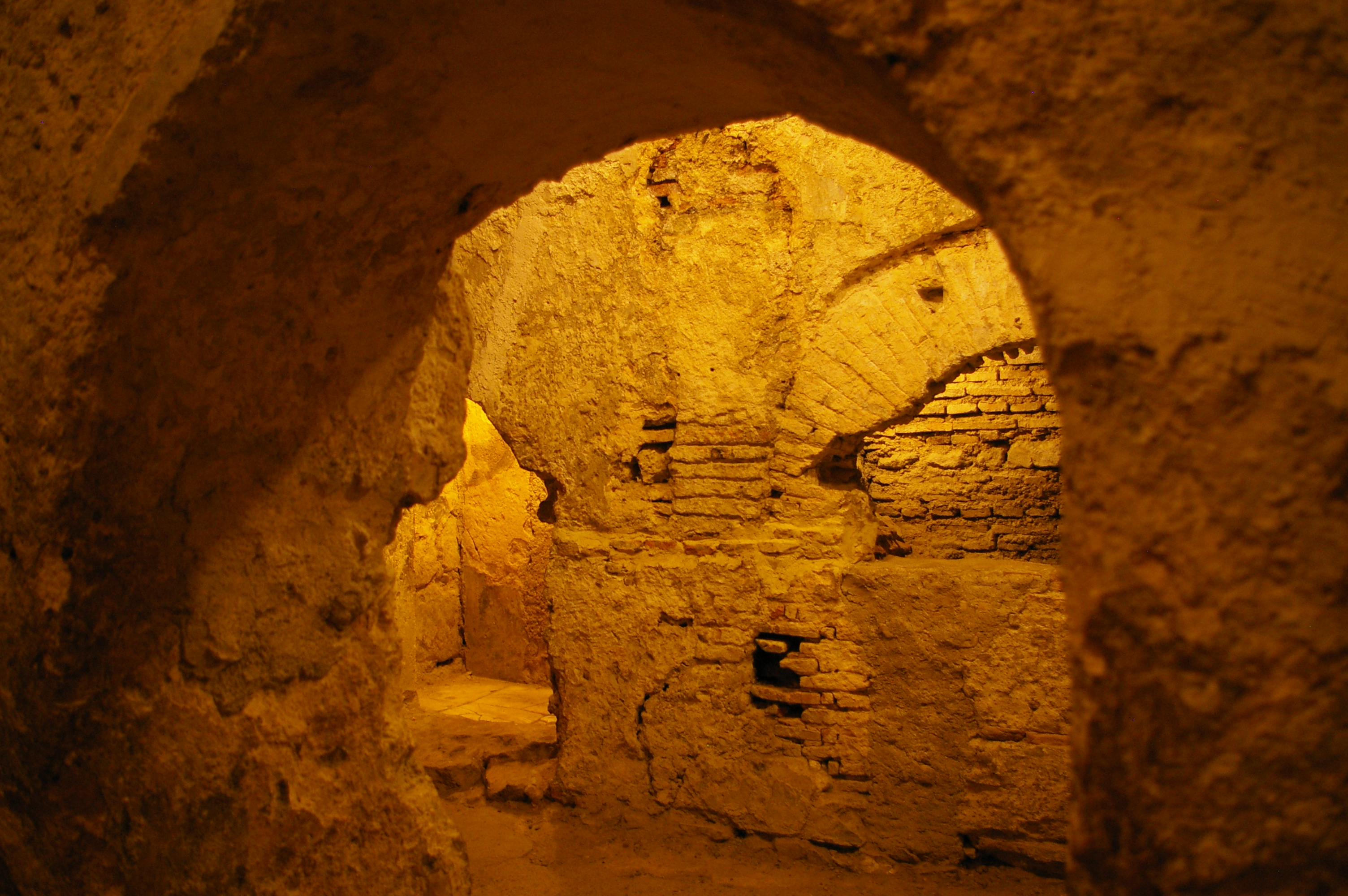 Baños reales del Alcázar de los Reyes Cristianos, Córdoba (España).